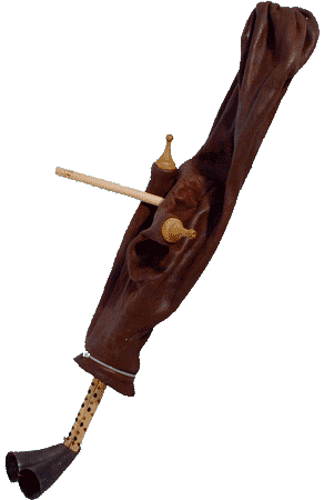 Aperçu d'un mezoued